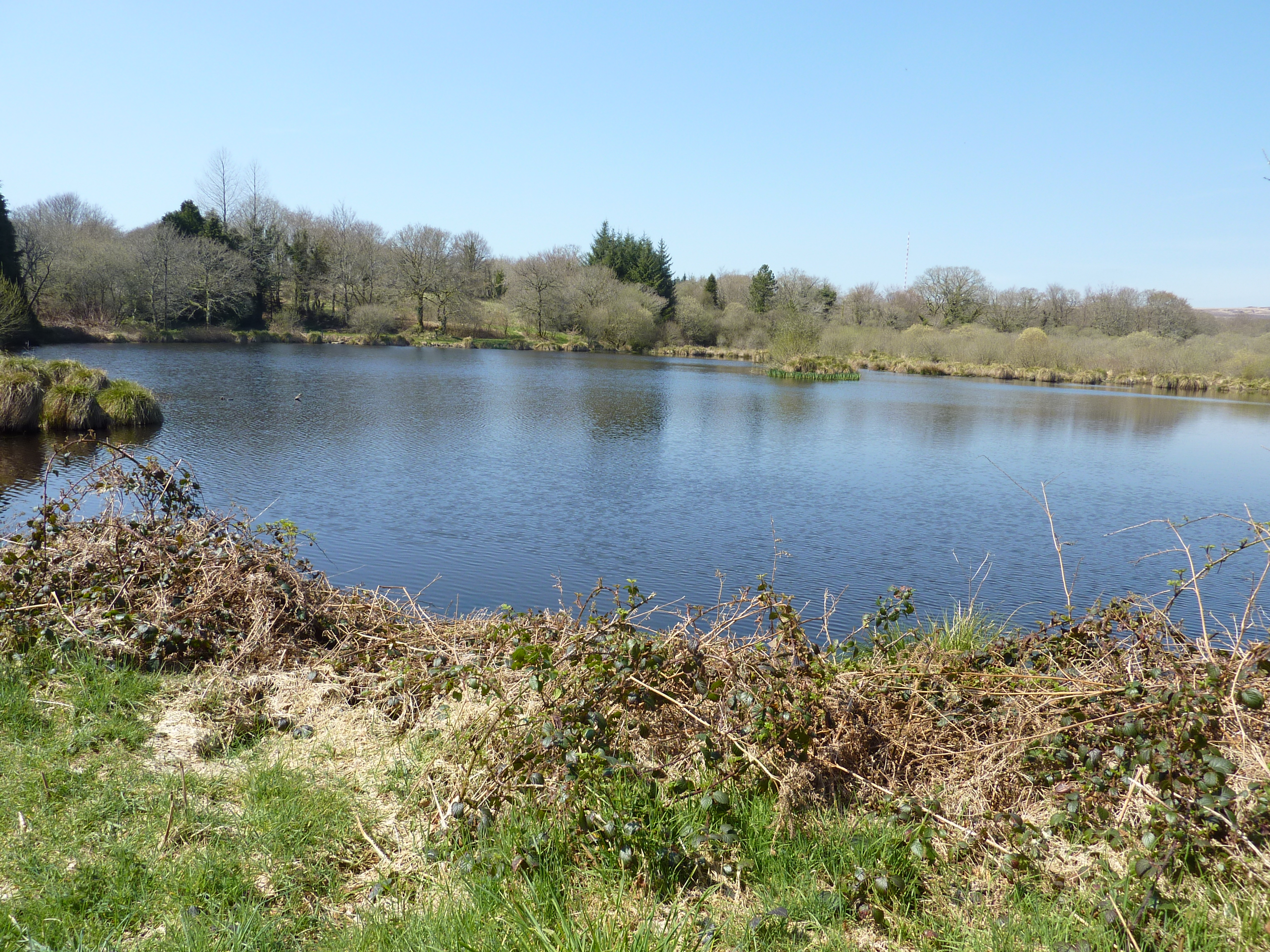 La Feuillée. Etang de Kervern.